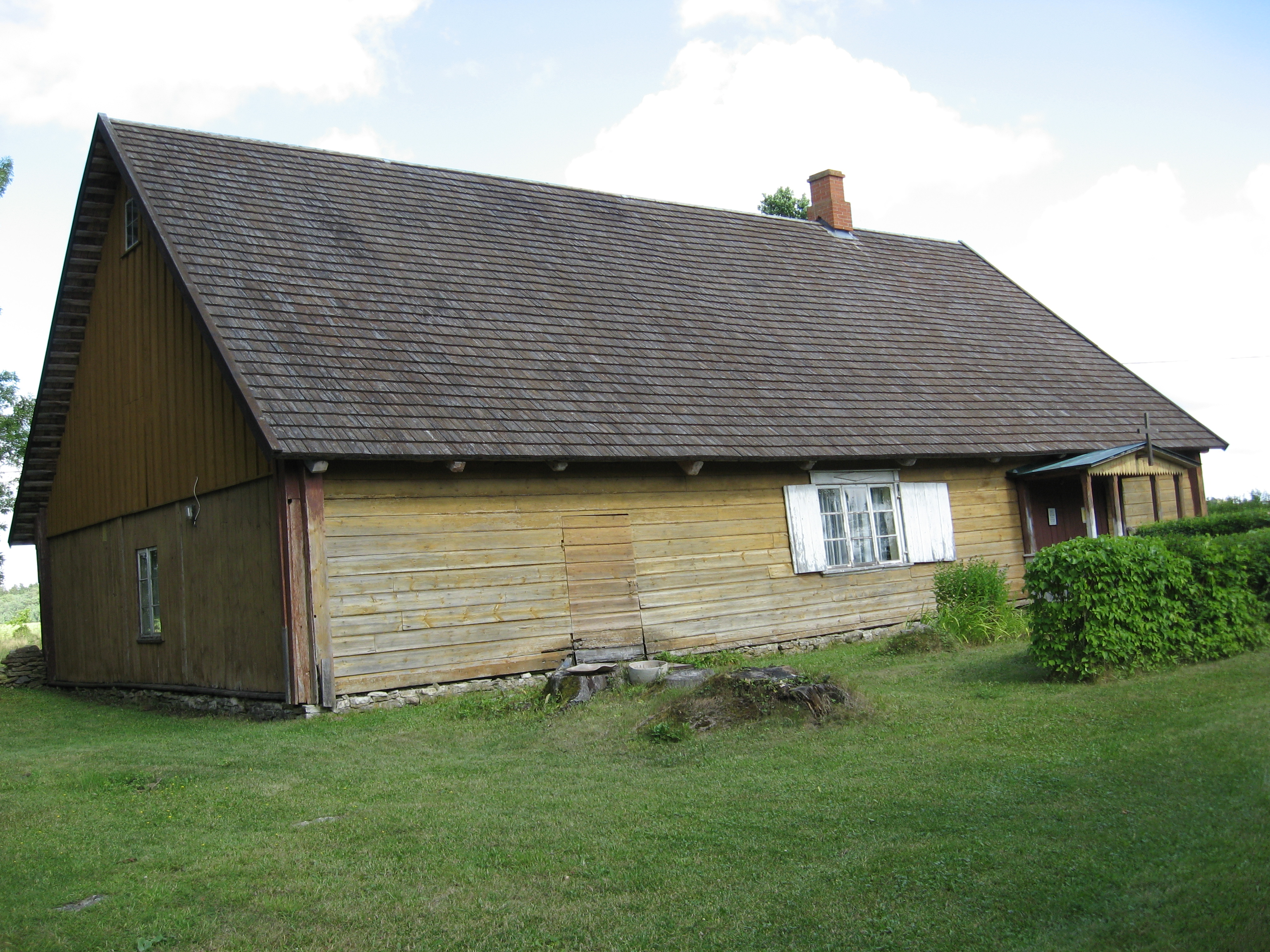 Pikavere palvemaja